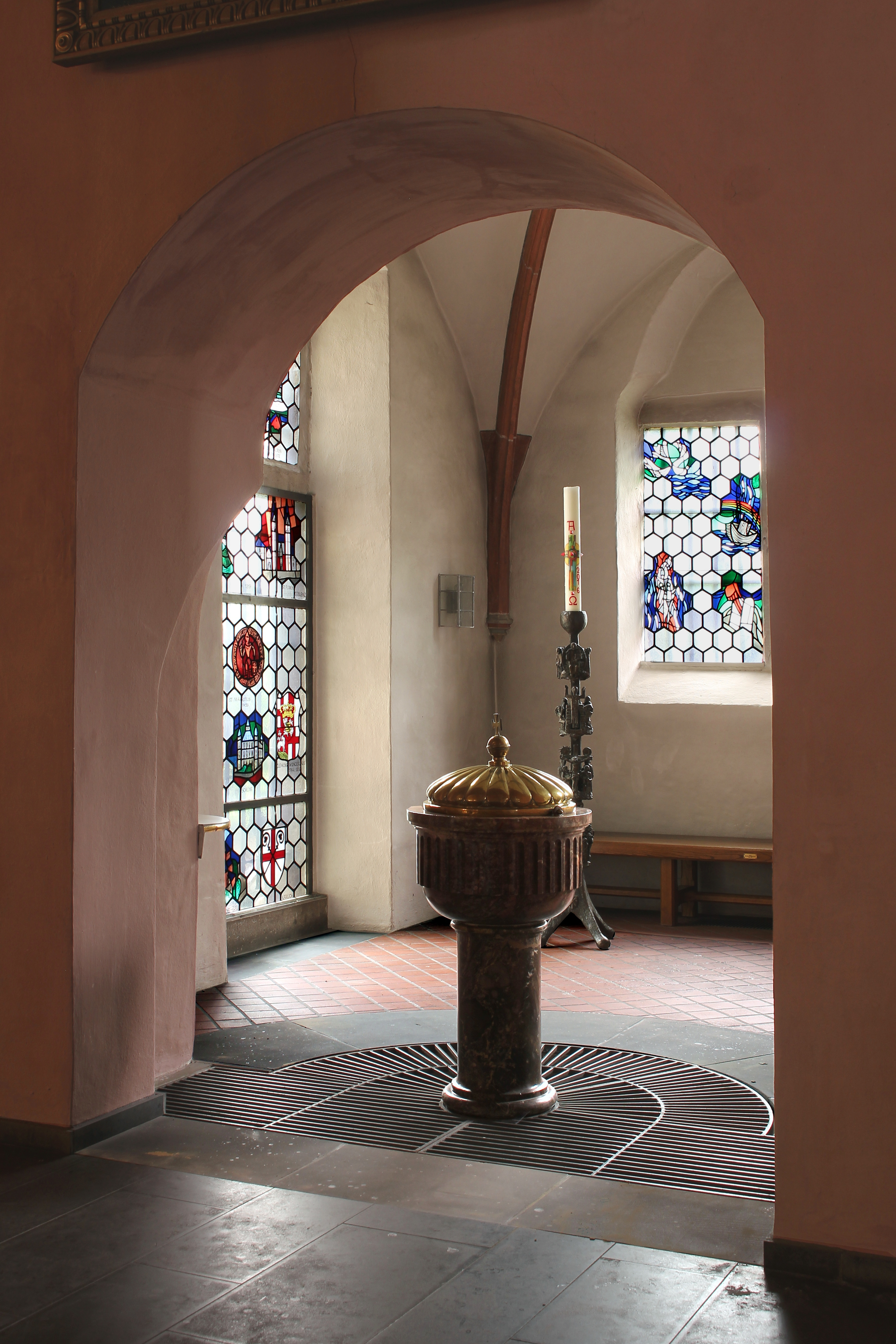 Taufkapelle der Pfarrkirche St. Mauritius Kärlich, Mülheim-Kärlich, Kirchstraße 17; gotischer Anbau aus der Zeit um 1450